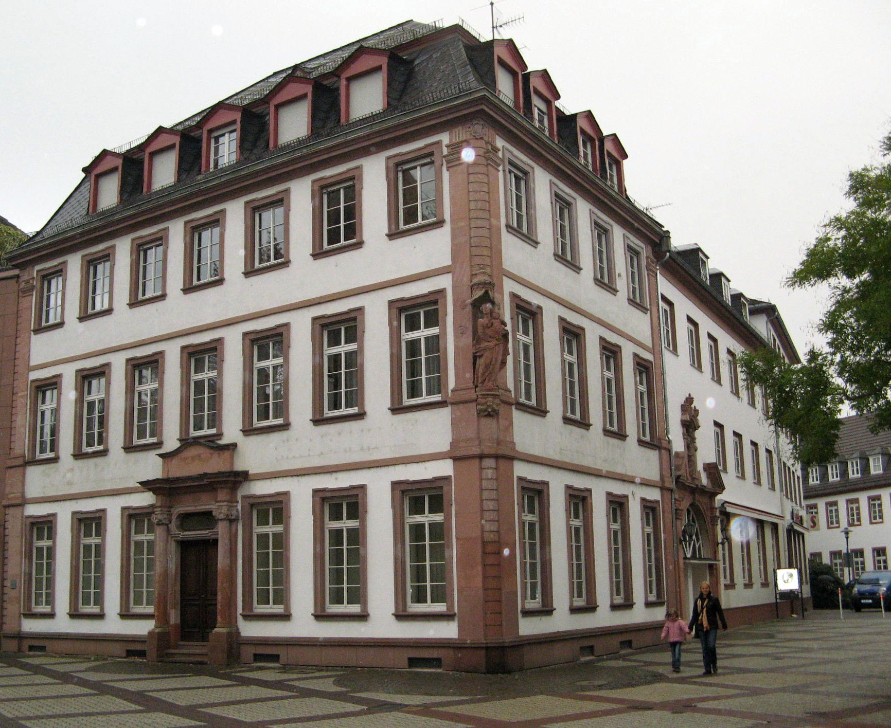 Gästehaus des Bentzelschen Hofs, Mainz